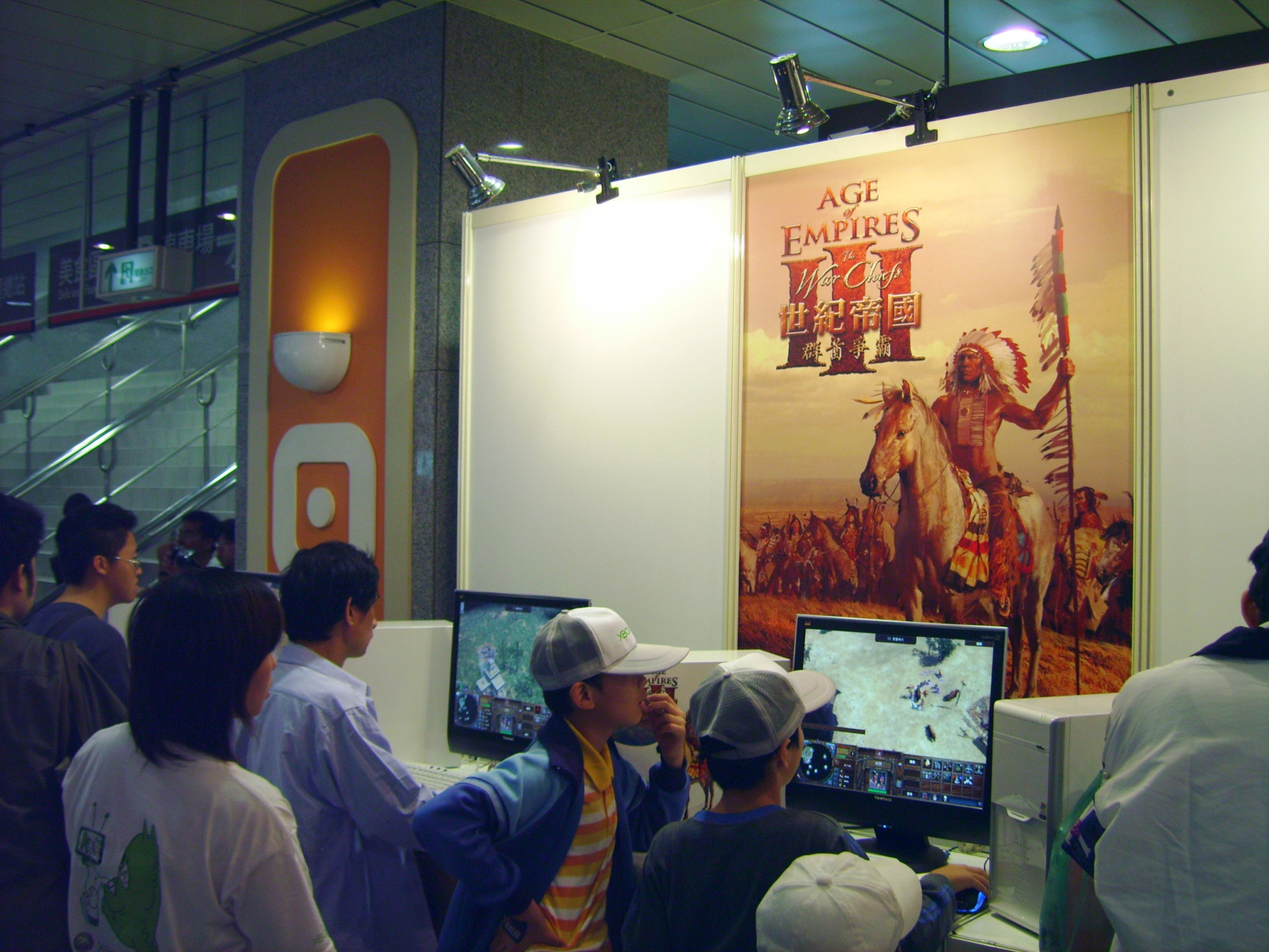 X06 Taiwan PC Game Area.